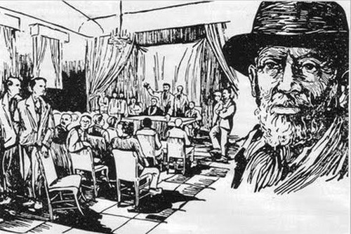 Sala Sivori nel 1892 durante il congresso per la fondazione del partito socialista, 14 agosto 1892 e ritratto di Turati